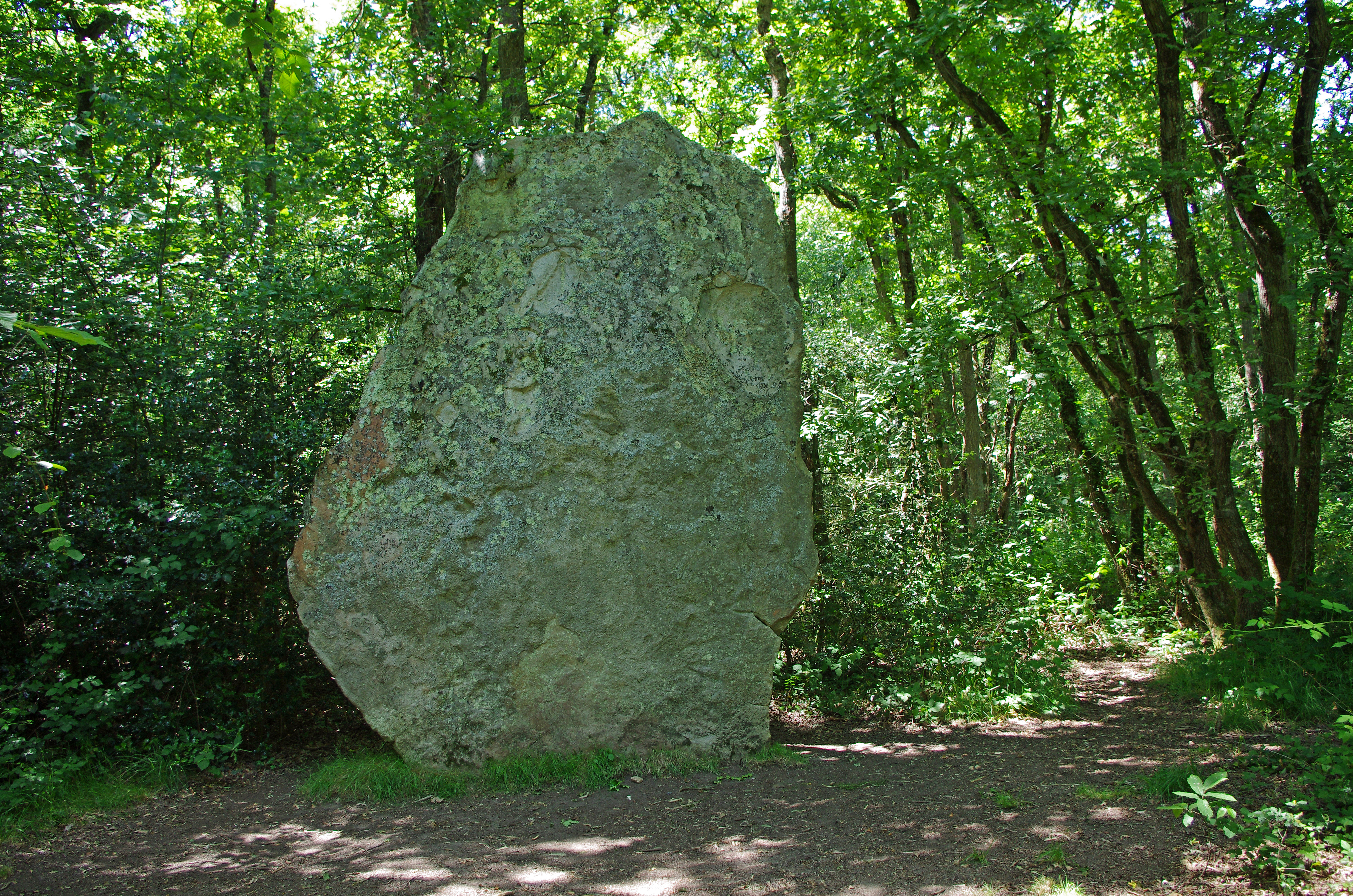 Pierre Longue ou Menhir de la Filoussière à Le Thoureil (Maine-et-Loire). Dalle de grès à sabals* de 4,80 mètres de haut, 3,80 mètre de large et 0,50 mètre d'épaisseur. Grès à sabals: Les grès à sabalites sont le témoin d'un climat tropical en Anjou. Les fossiles végétaux, feuilles de palmier sabalites de l’éocène (55- 33 millions d'années) figurent dans la formation dite des «grès à sabals». Pierre-Longue or Menhir of Filoussière Le Thoureil (Maine-et-Loire). Sandstone slab to sabal * 4.80 meters high, 3.80 meters wide and 0.50 meters thick. Sandstone sabal: The sandstone sabalites are witnessing a tropical climate in Anjou. The Plant fossils, leaves sabalites palm of the Eocene (55-33 million years) are included in the so-called "sandstone has sabal" training.